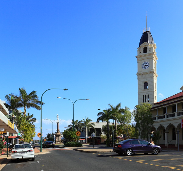 Poste de Bundaberg